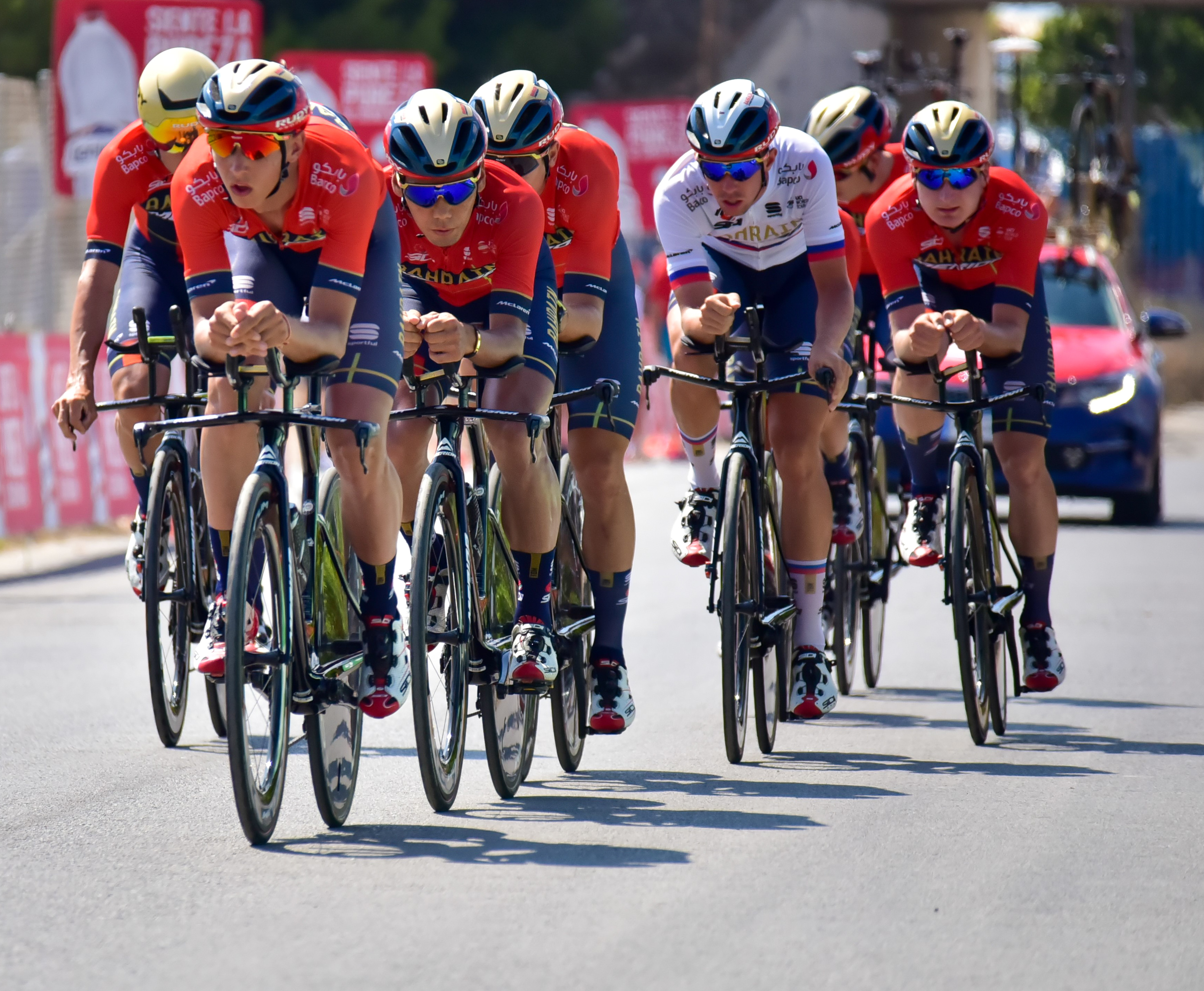 First Stage